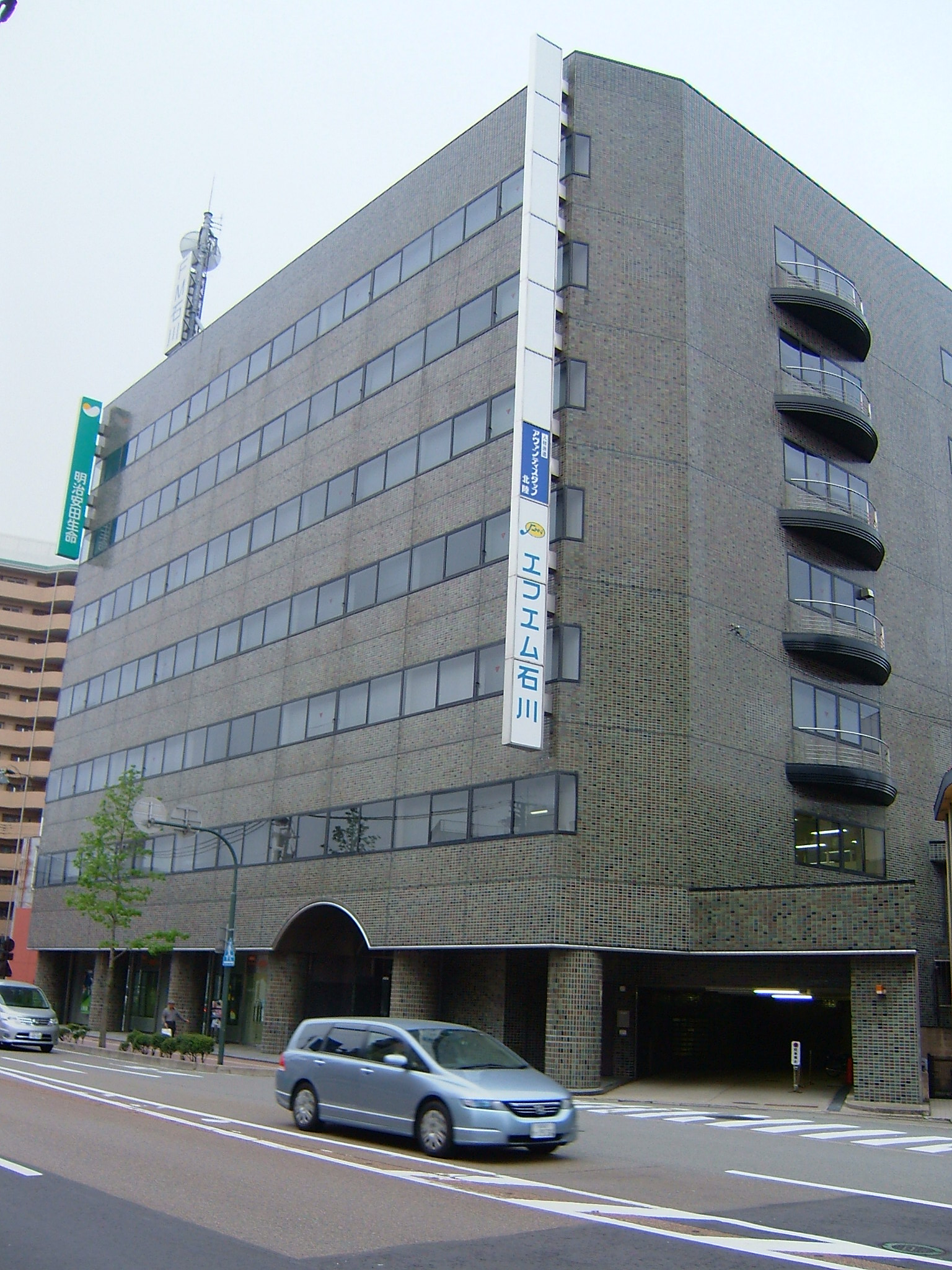 エフエム石川本社が入居する明治安田生命金沢ビル（石川県金沢市彦三町）